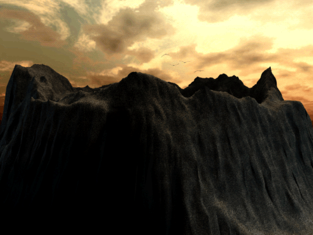 Capture d'écran du jeu vidéo L'Amerzone (1999), développé et édité par Microïds.